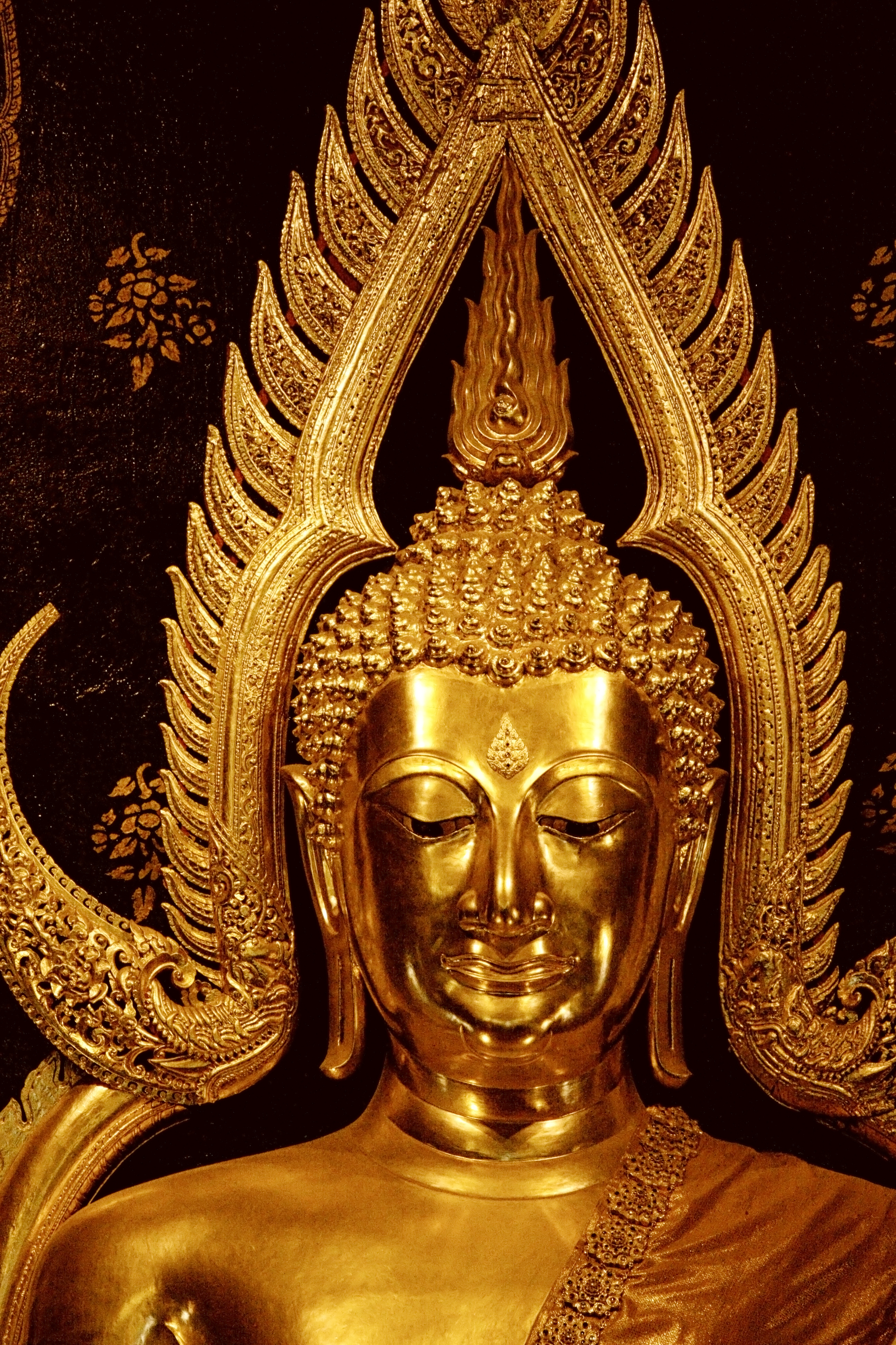 วัดพระศรีรัตนมหาธาตุวรมหาวิหาร